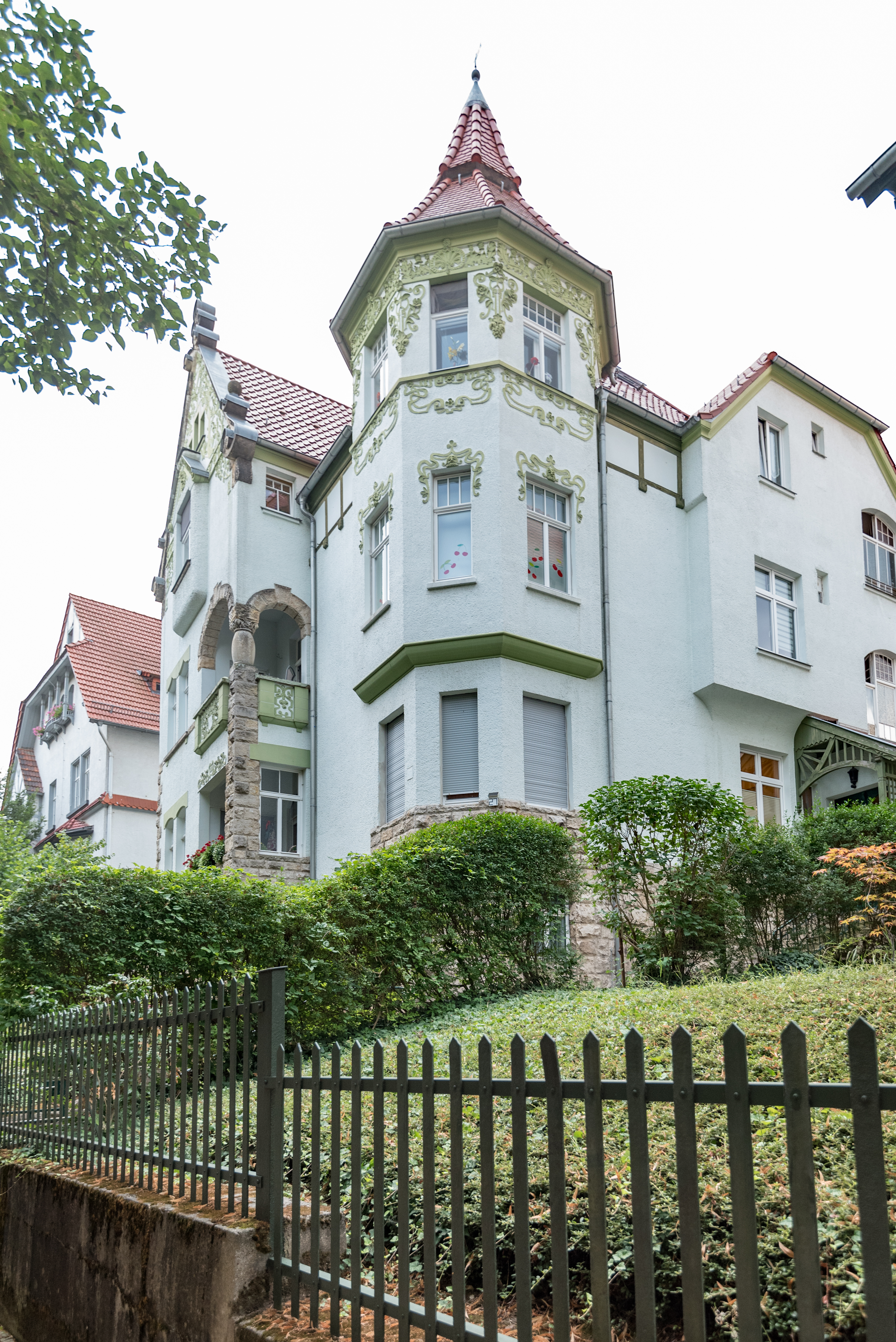 Naumburg (Saale), Buchholzstraße 27